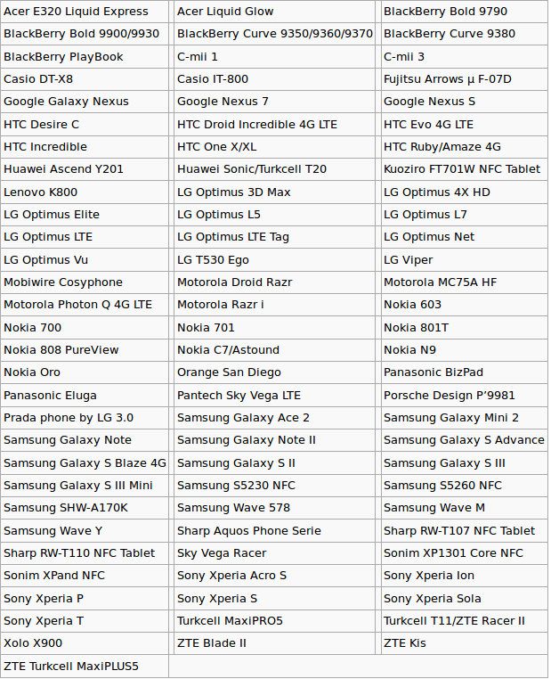 Phones NFC